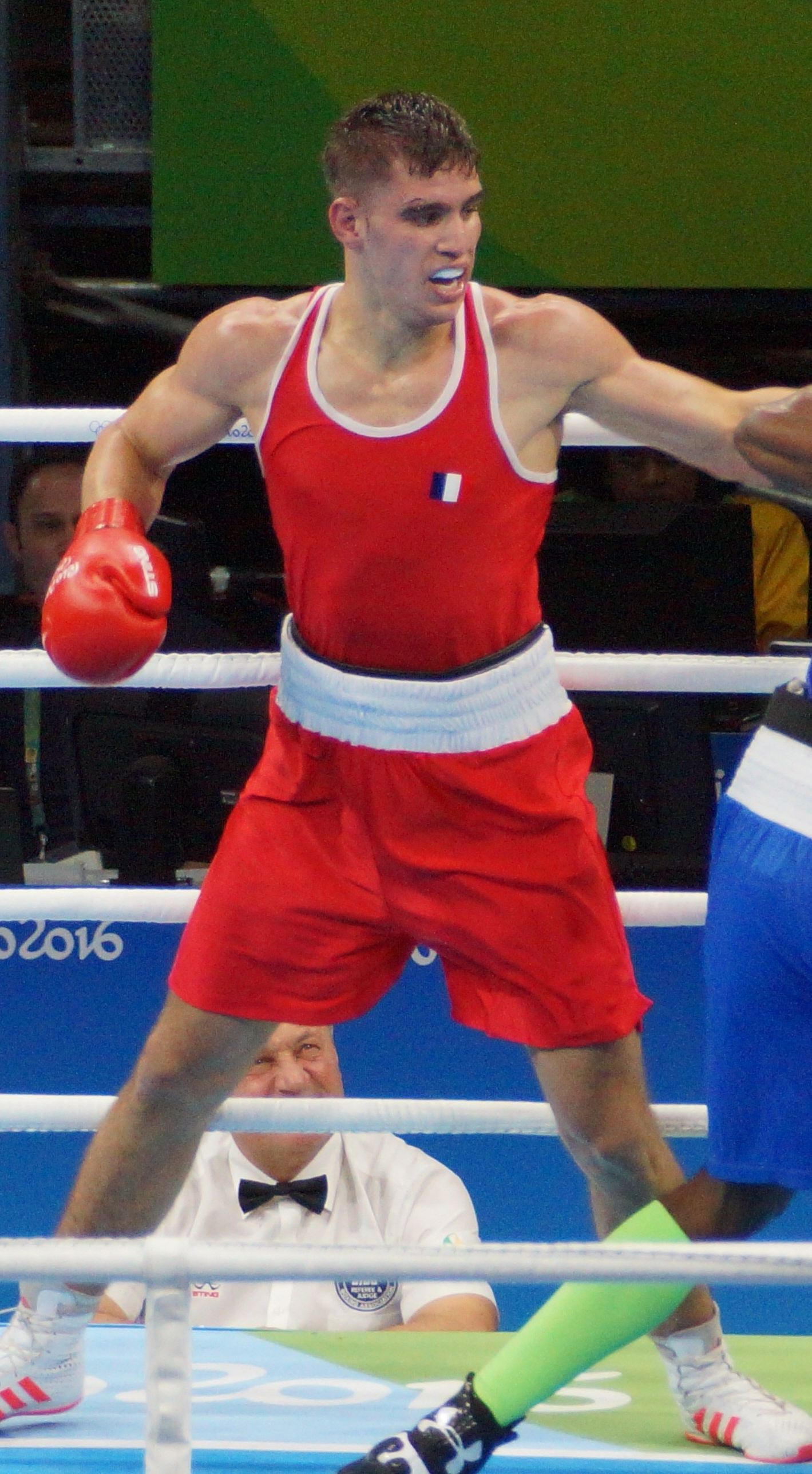 Mathieu Bauderlique, Rio Olympics